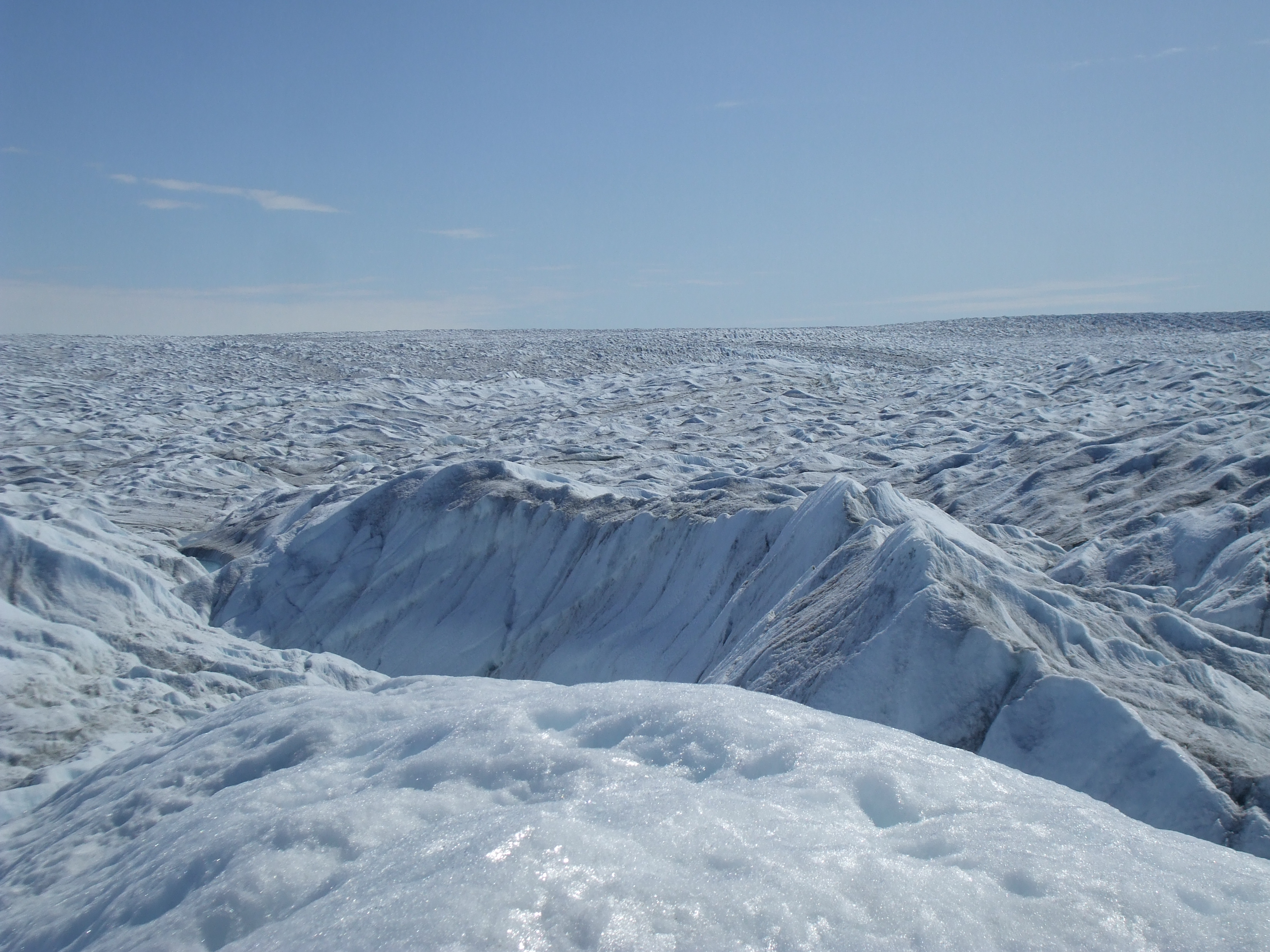 Inlandsis Groenland 2009 Expédition ACarré